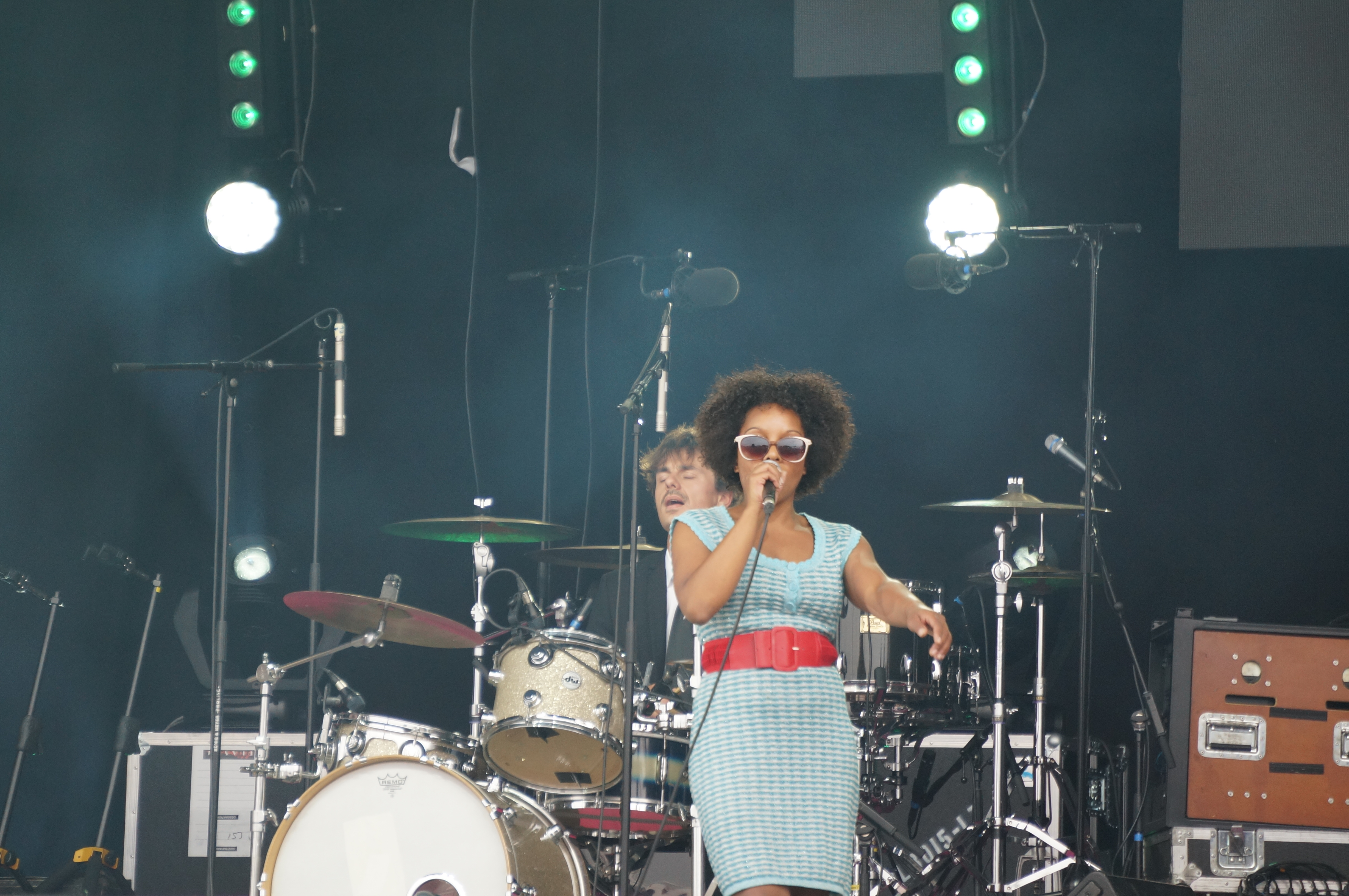 Spectacle du dimanche 1 septembre 2013, les Moodhunters( Kévin L'HERMITE (Batteur) , Pierrick JOURNAUX (Bassiste), Bertrand MARANT (Guitariste), Julien MAZINGANT (Percussionniste), Julien ADAM; Instrumentiste cuivre : Trompettiste Fred PERRY; (Instrumentiste bois : Saxophone Ténor, Ebène (Chanteuse)), la première partie de Jenifer.